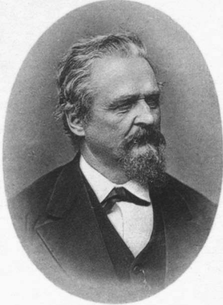 Porträtfotografie von Sigmund Schott.